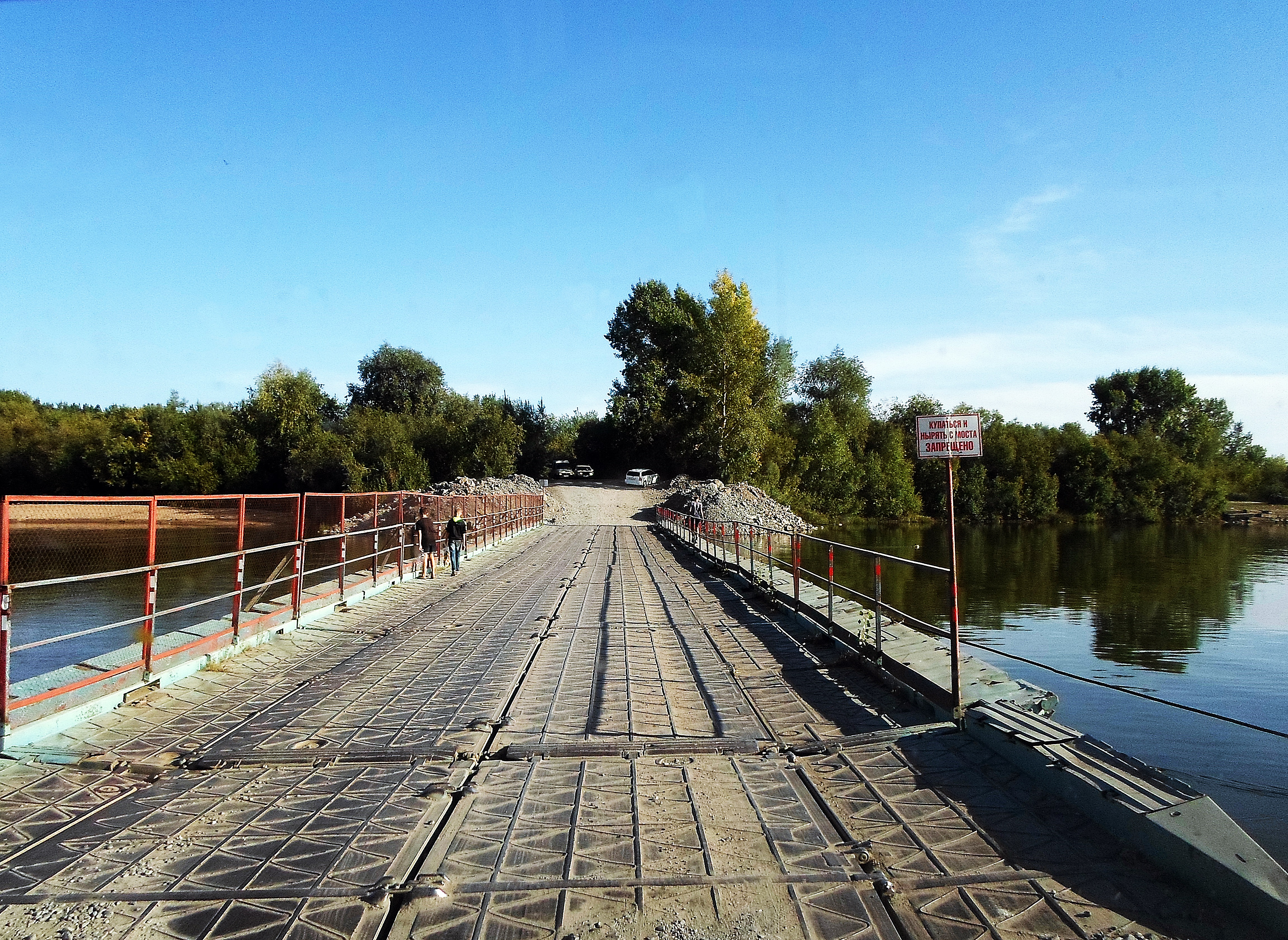 Понтонный мост через Чулым у Ачинска. Въезд с левого берега.